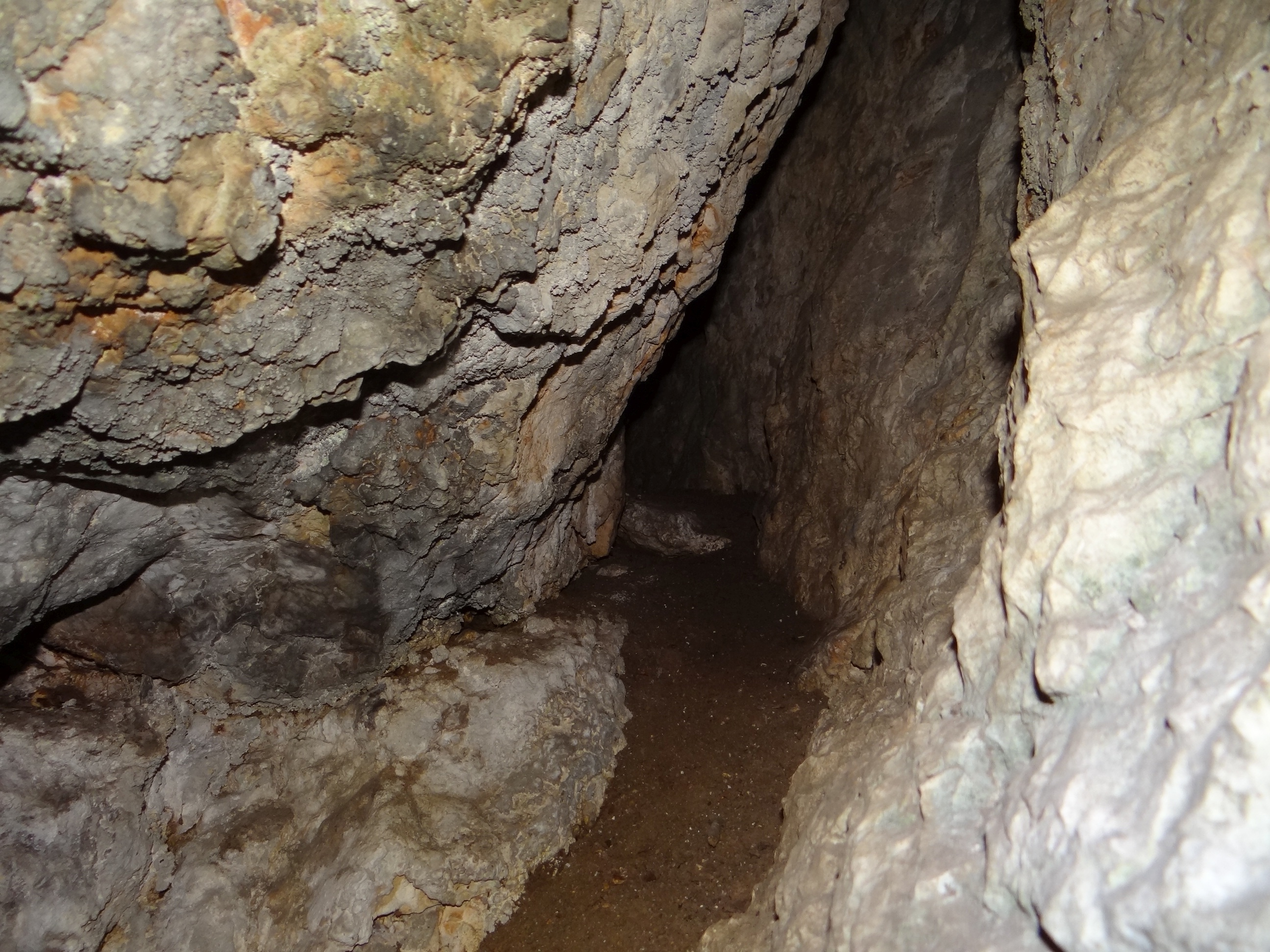 Jaskinia w Zielonym Dole